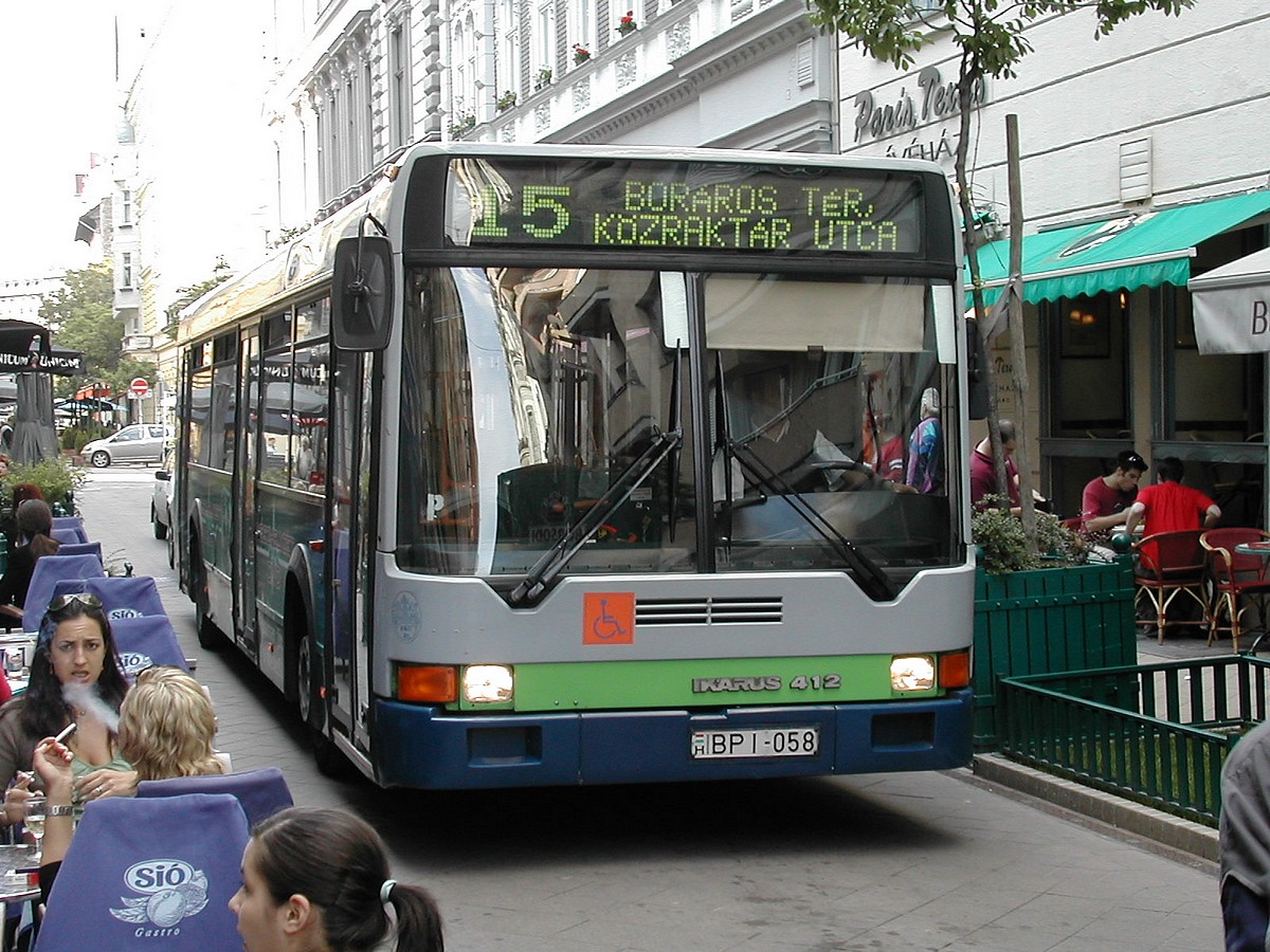 Ikarus-412 in Budapest